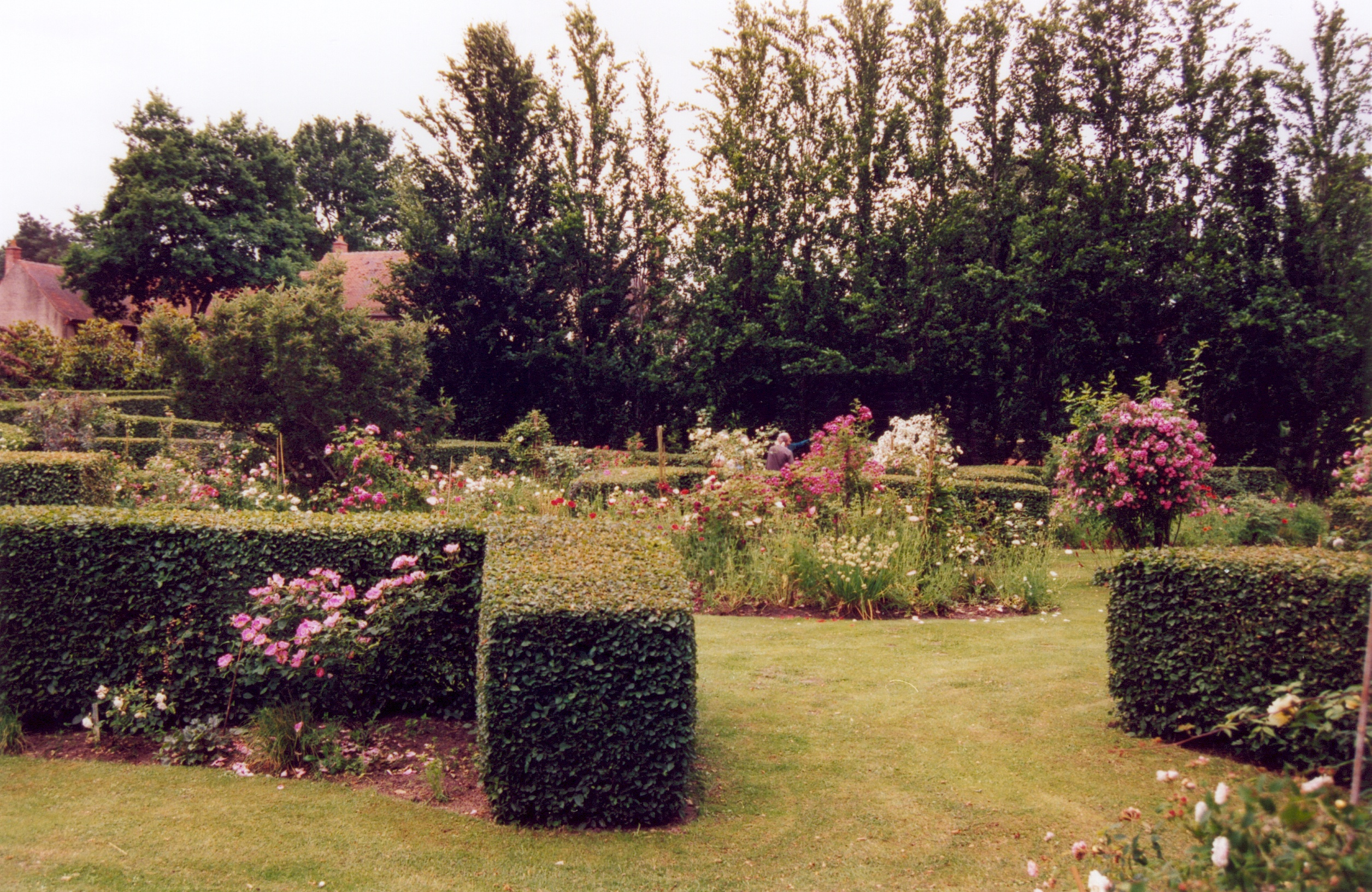 France Loiret Ingrannes Arboretum des Grandes Bruyères Photographie prise par GIRAUD Patrick